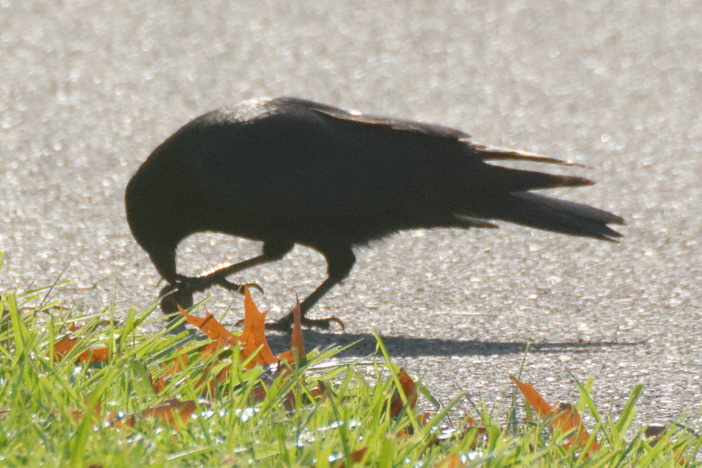 Dimanche 30 octobre, a eu lieu le 3ème championnat régional de cyclo-cross, au parc de la Douce, à Bavilliers.